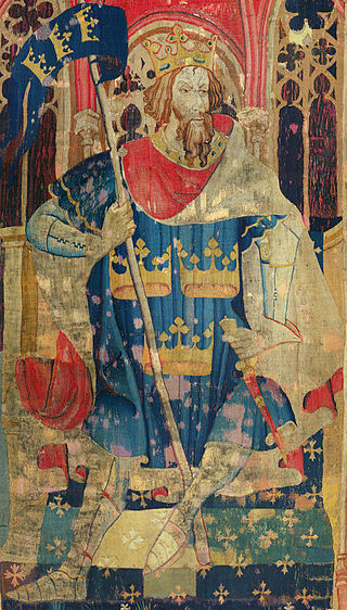 მეფე არტური